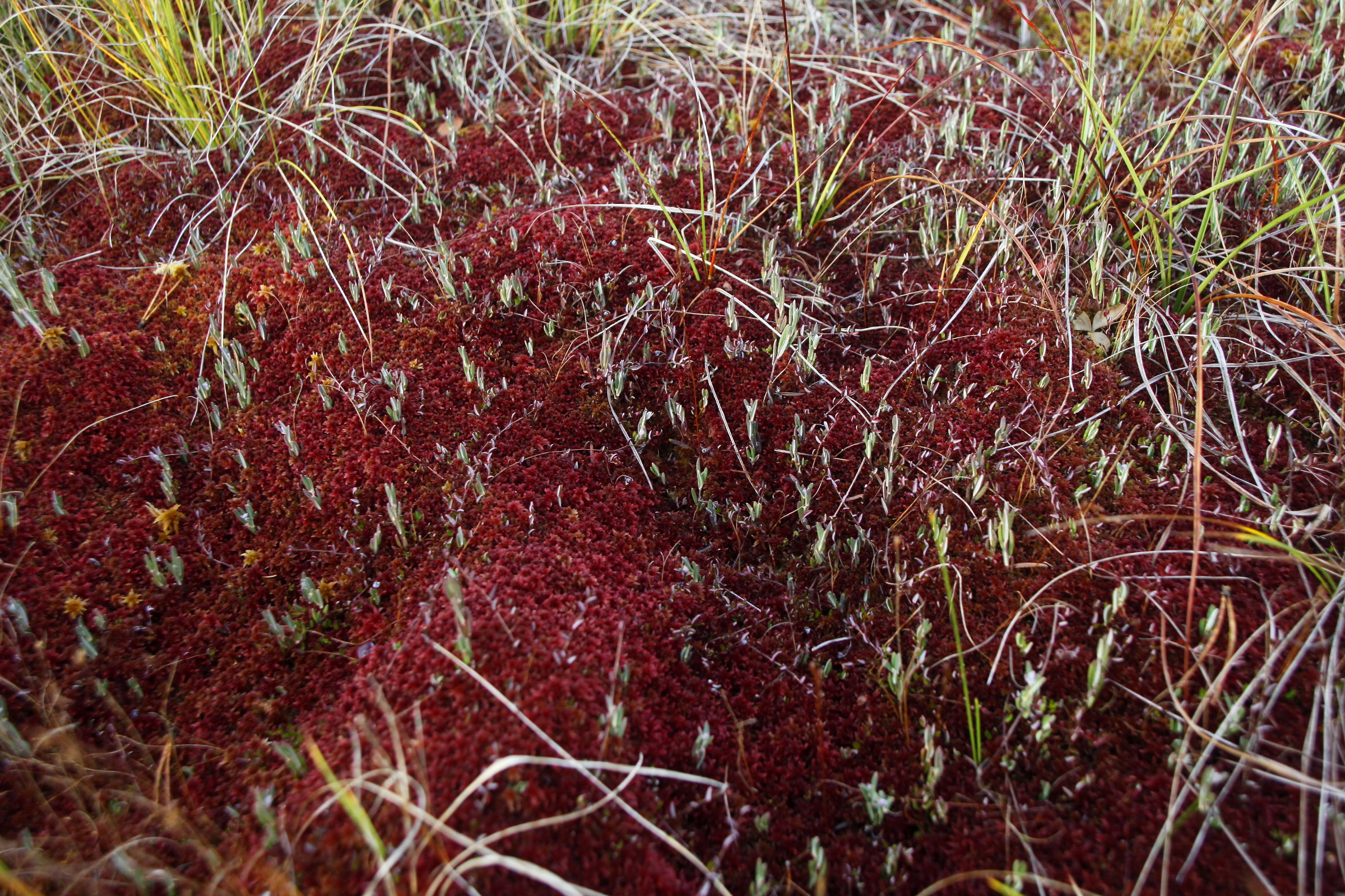 Coussin de sphaignes dans la RNR de la Seigne des Barbouillons